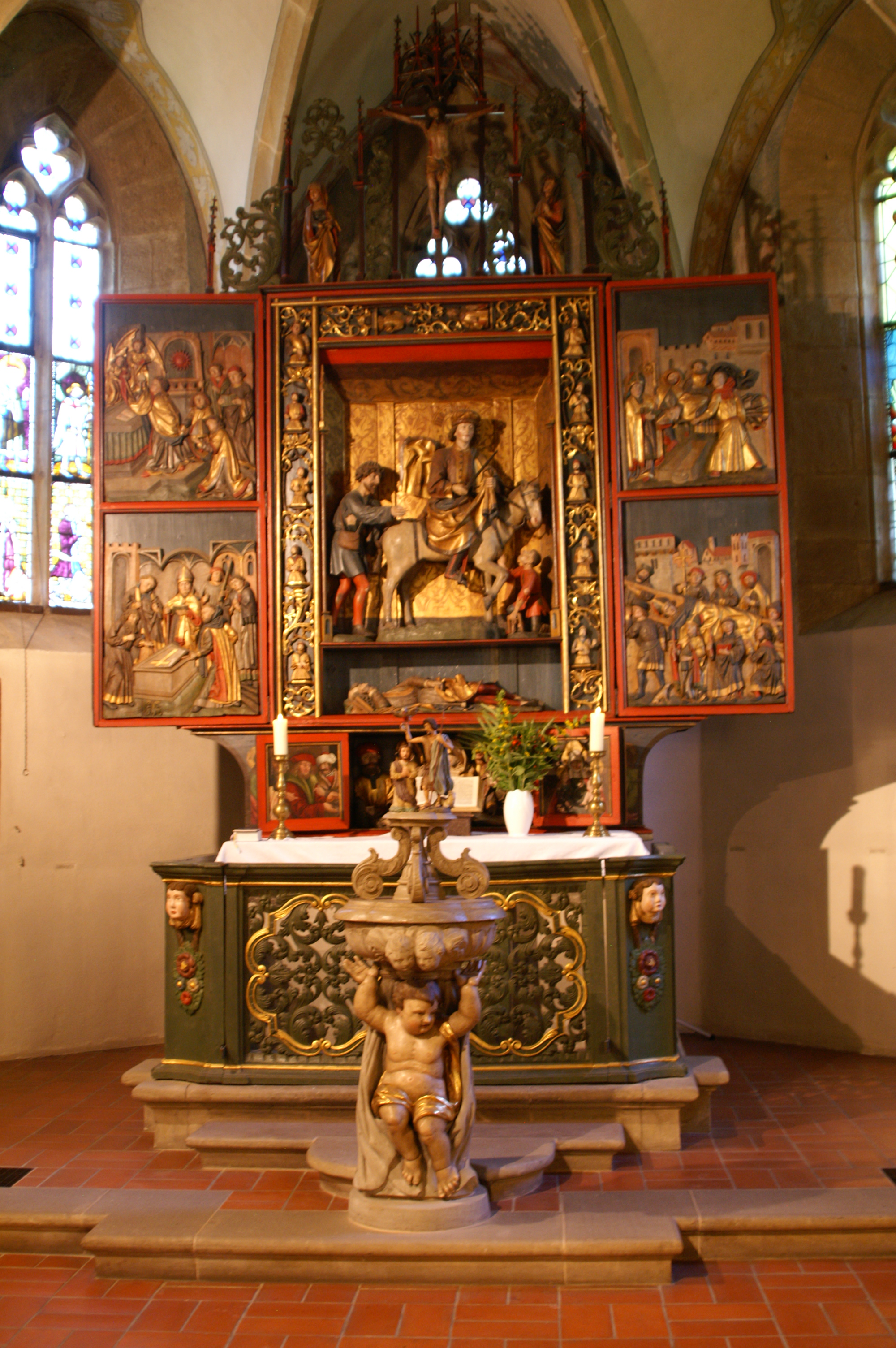 Martinsaltar St.-Martinskirche (Stöckenburg). Gesamtansicht